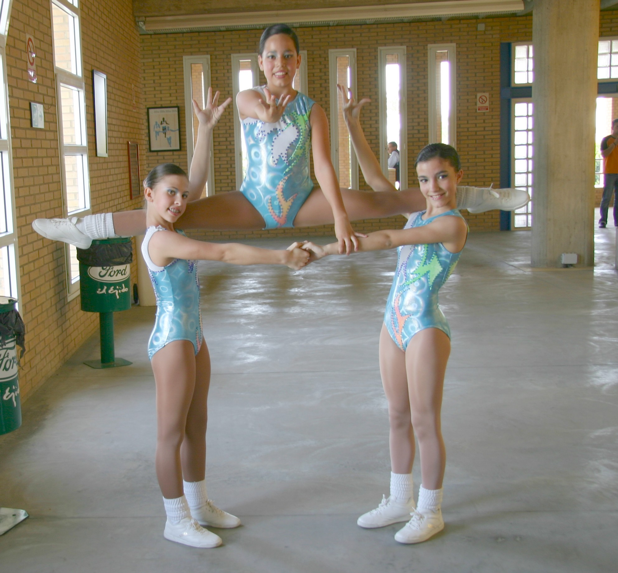 Muestra una figura de entrada en un ejercicio aeróbico realizada en un campeonato nacional